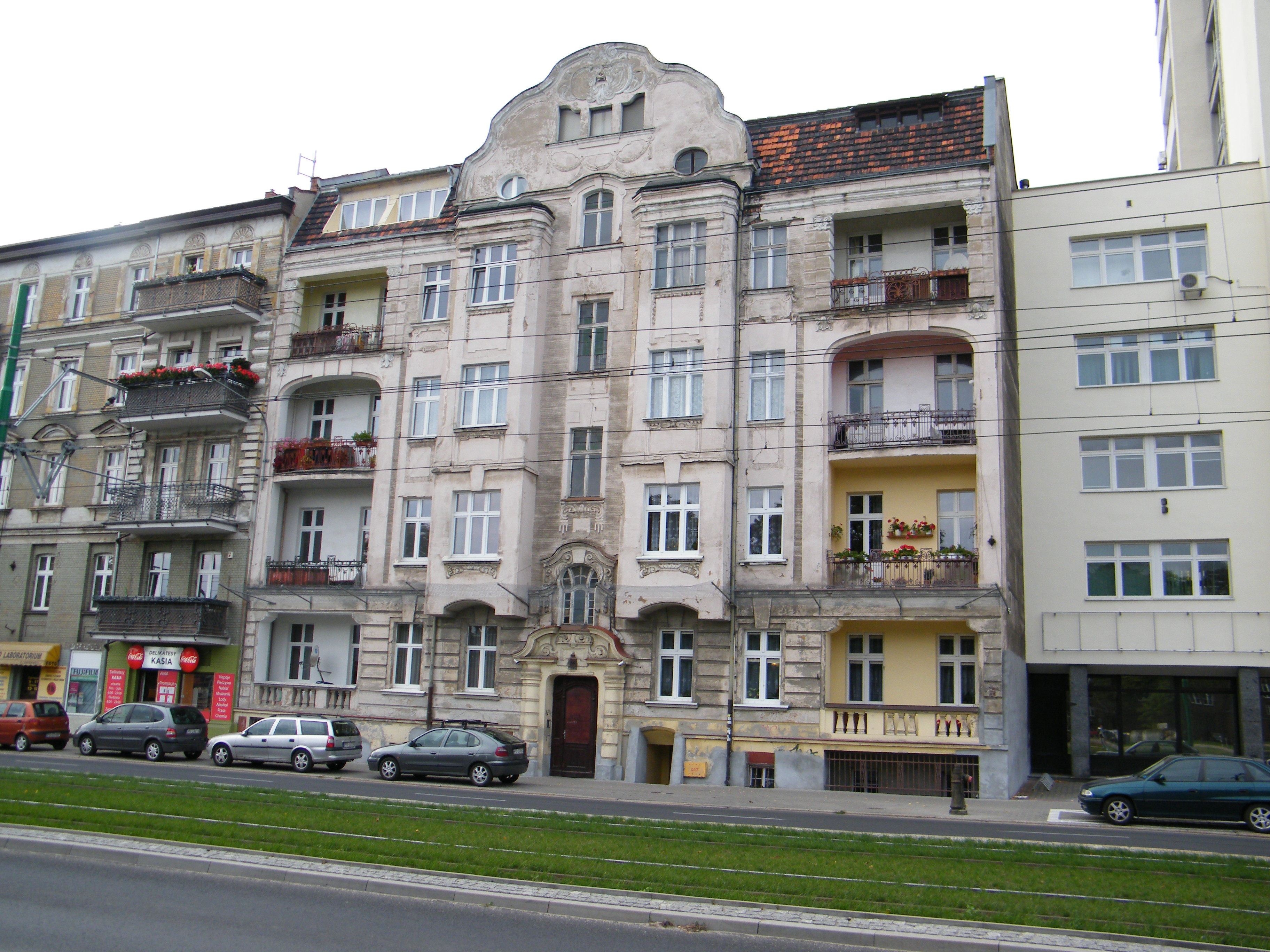 Poznań, kamienica, 1900-1910